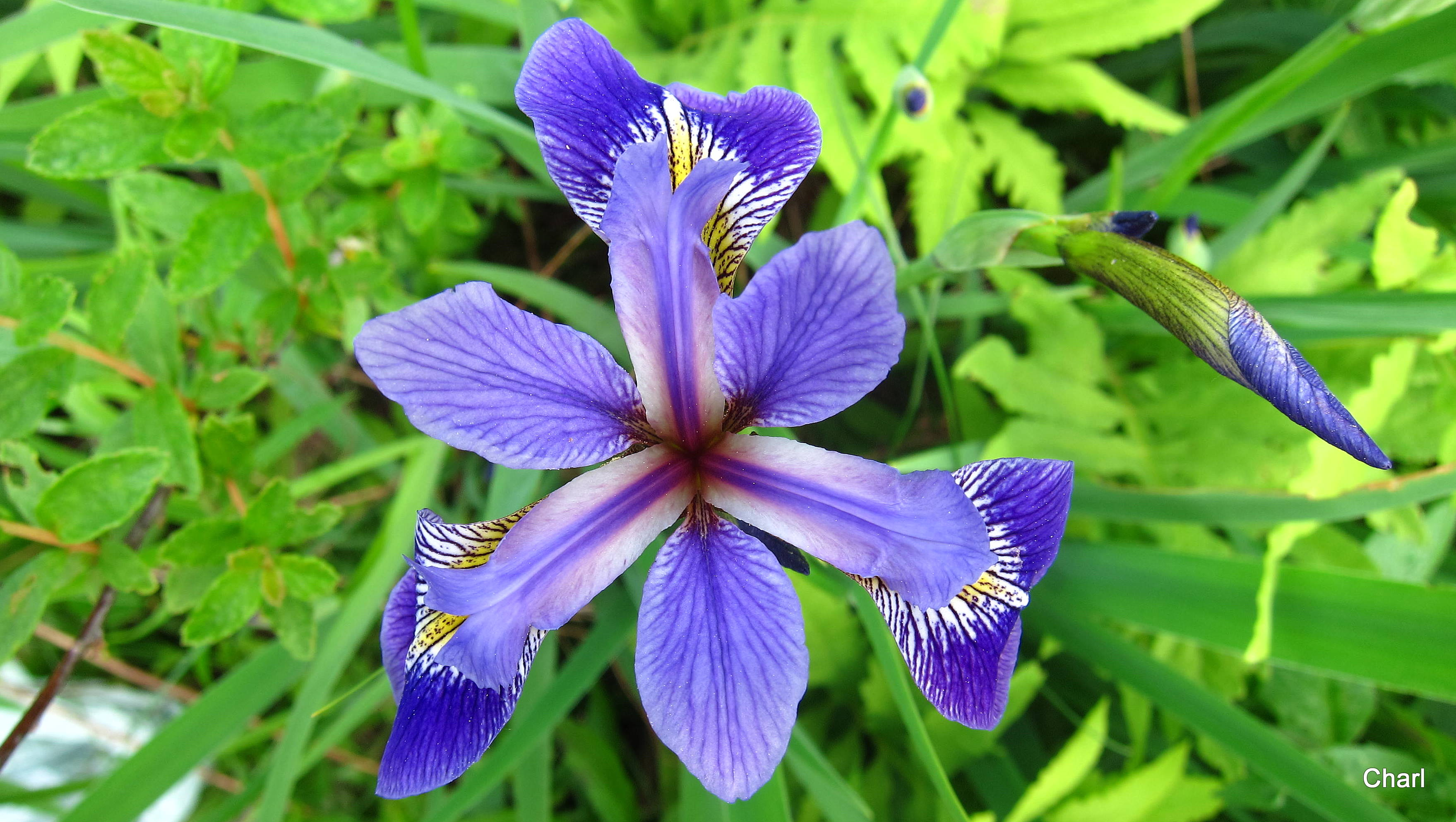 la camera donne une couleur bleue a cette fleur mauve